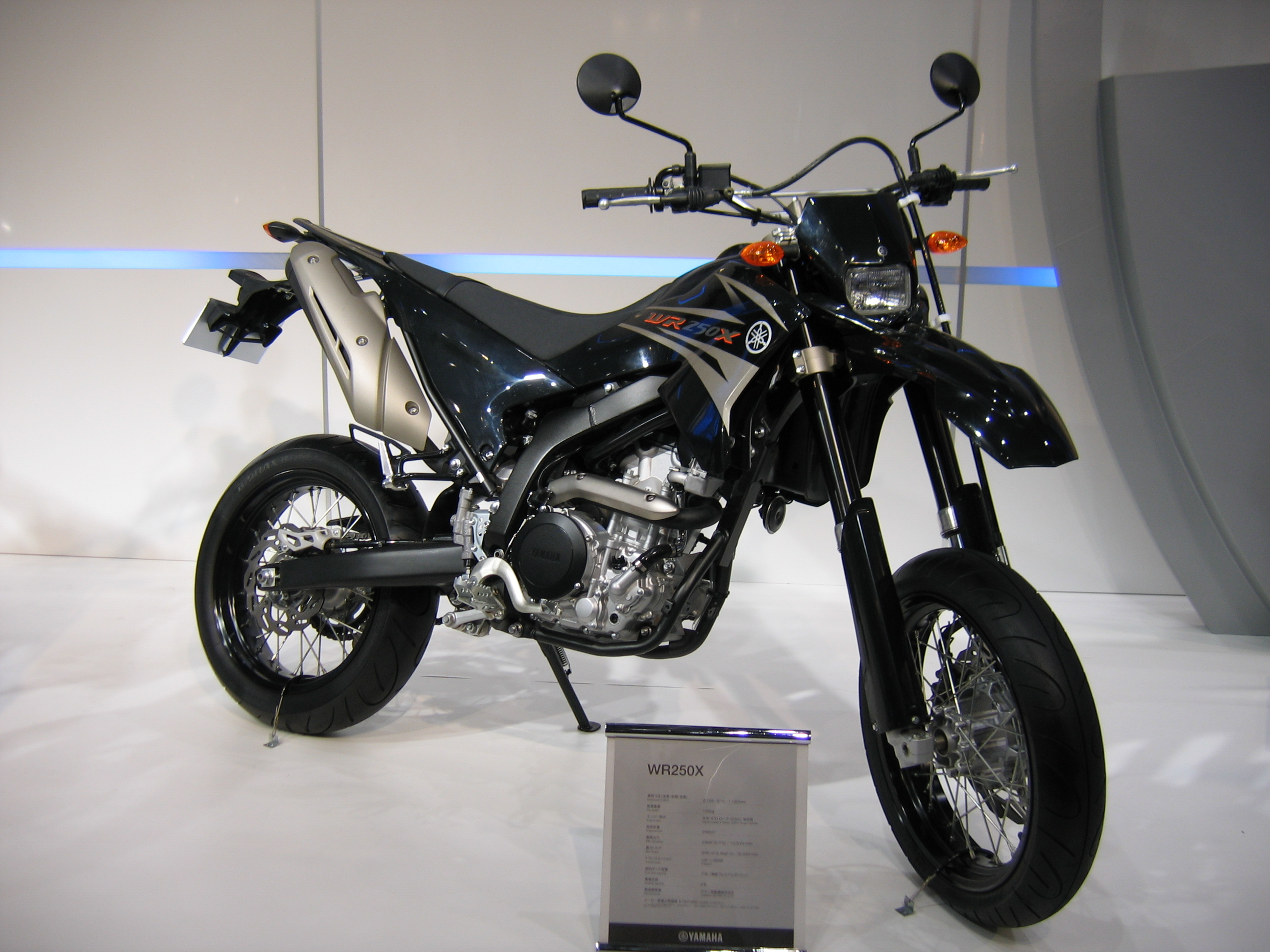 YAMAHA WR250X